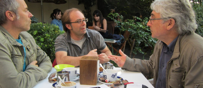 Avelino González, Xesús Ron e Xulio Lago en abril de 2012.